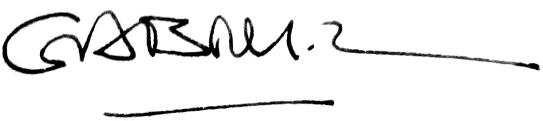 Image of Gabriel Garcia Marquez signature